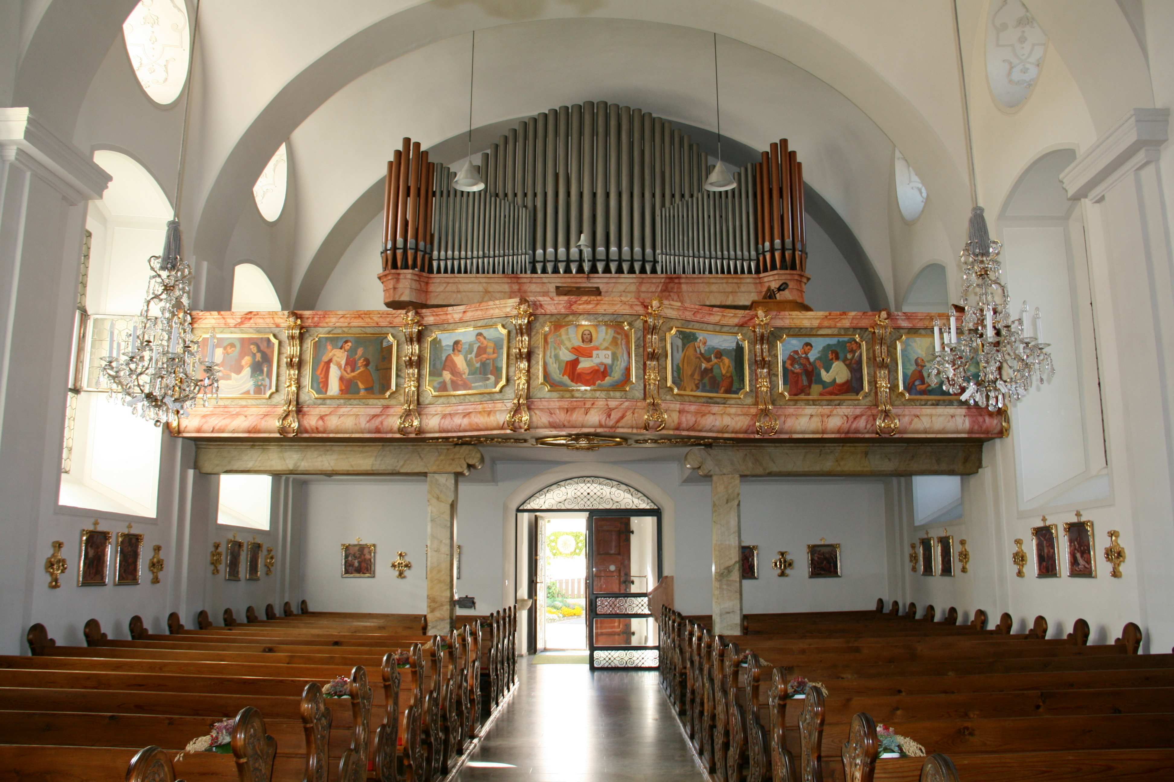 Kath. Pfarrkirche hl. Margaretha und Kirchhofmauer mit Nischenkapellen